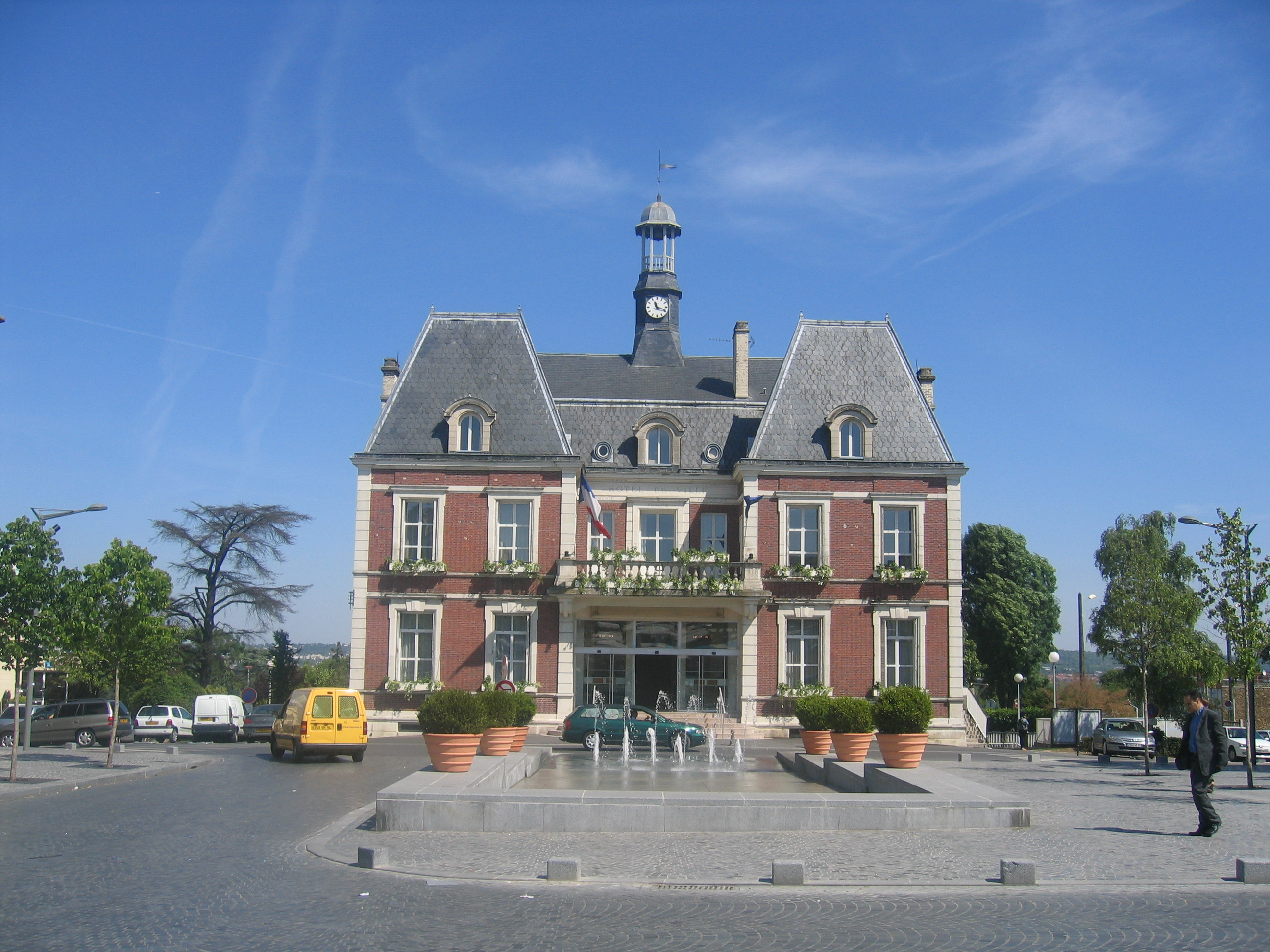 Hôtel de ville de Noisy-le-Grand en France.